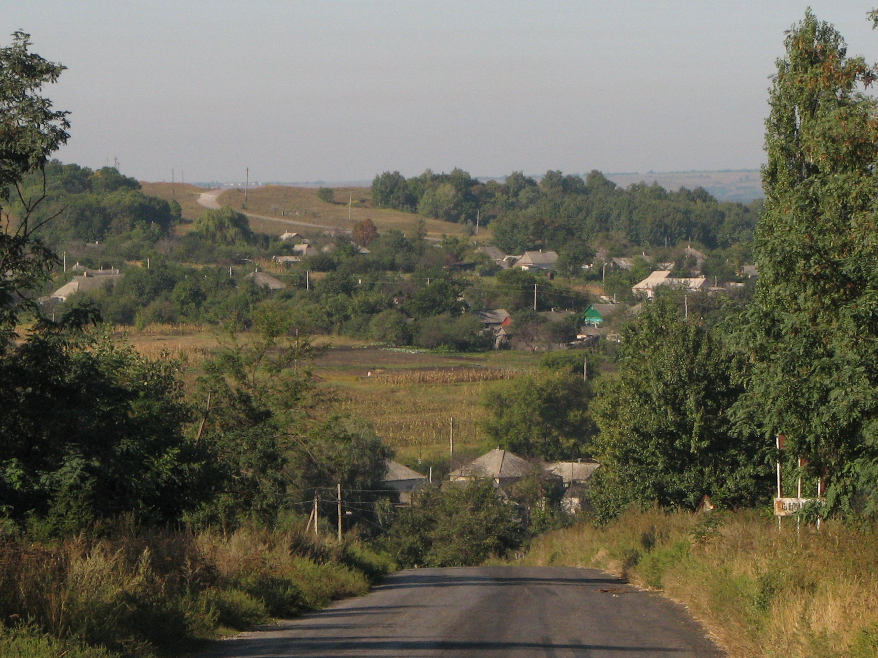 Shipilivka, Ukraine